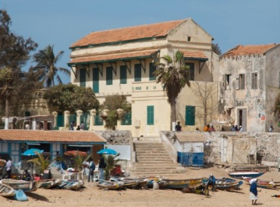 Vu complete du musee de la mer de Goree